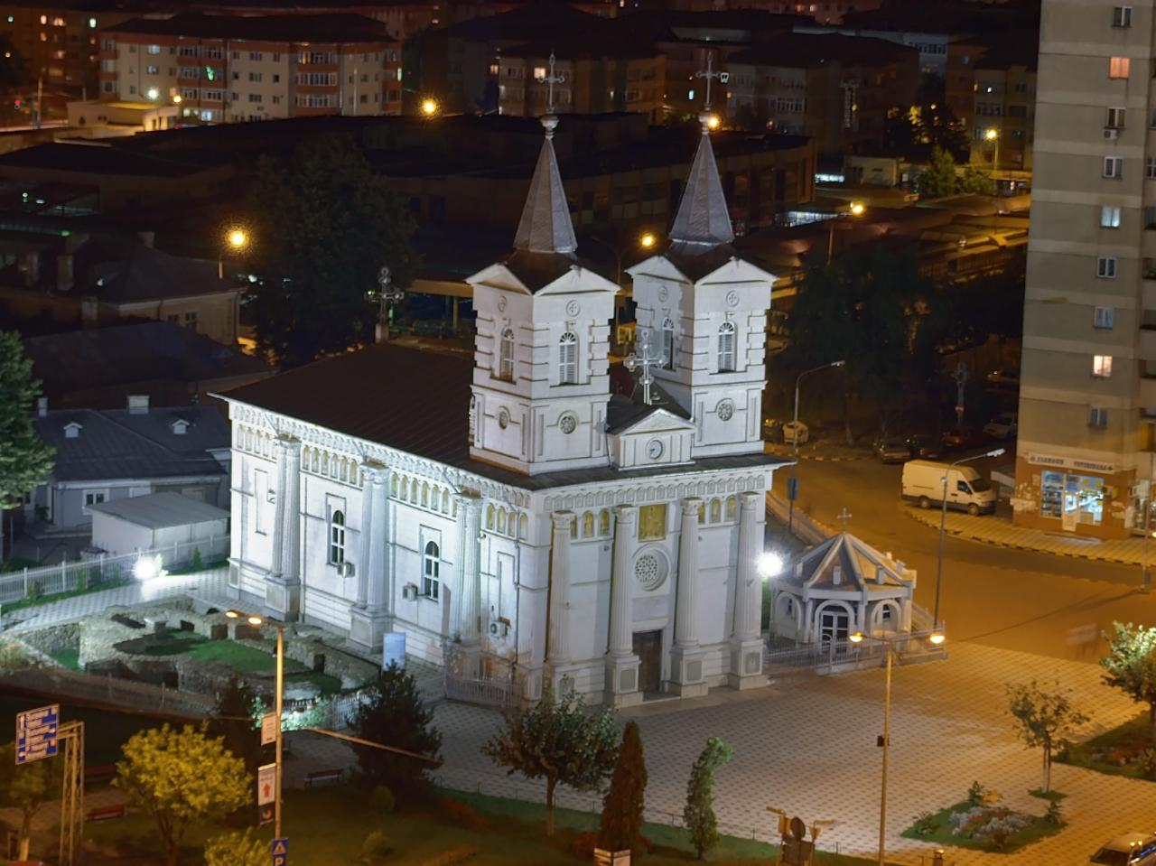 Biserica Sf. Neculai Bacǎu